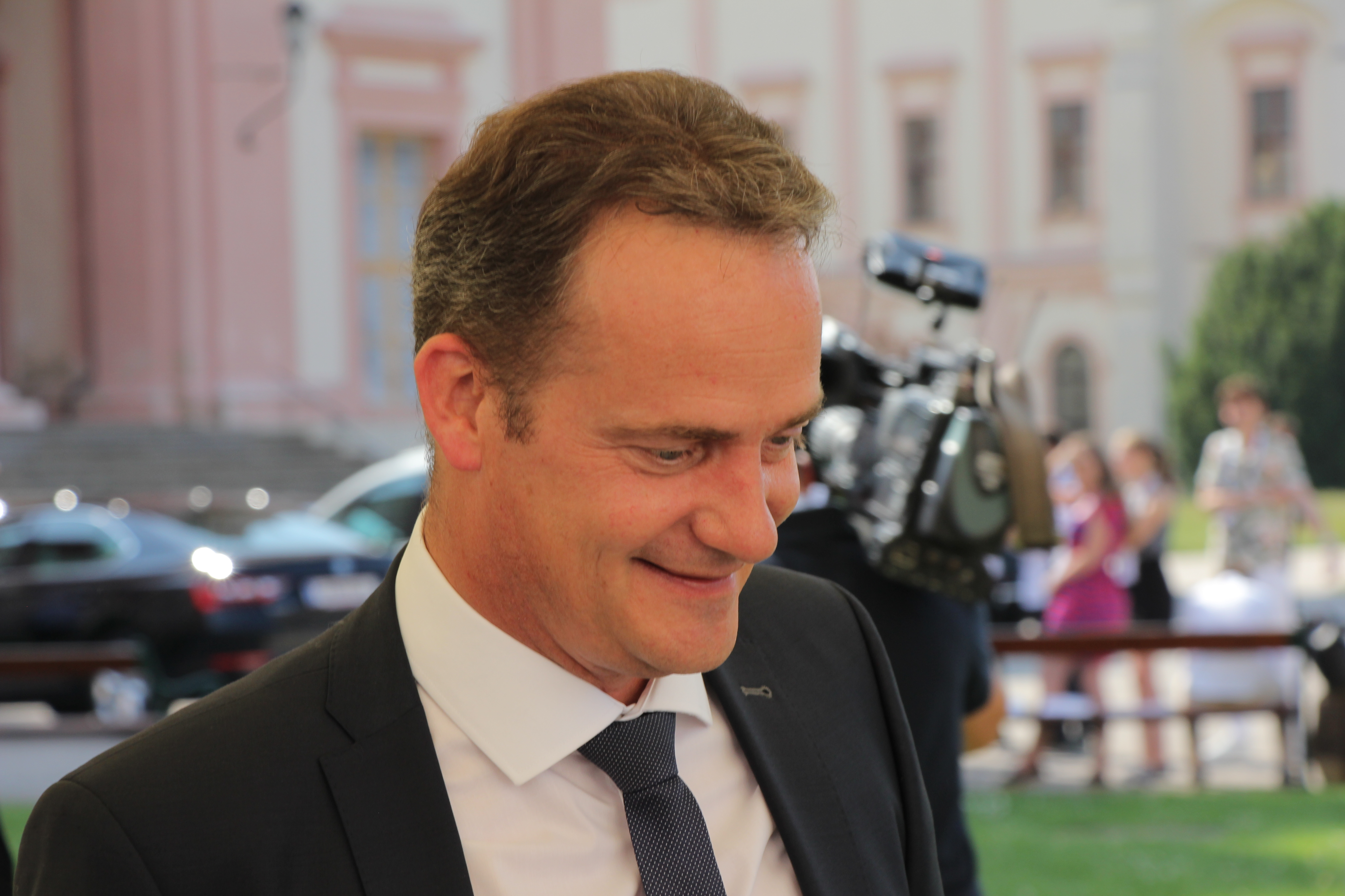 Europaforum Wachau 2019 auf Stift Göttweig